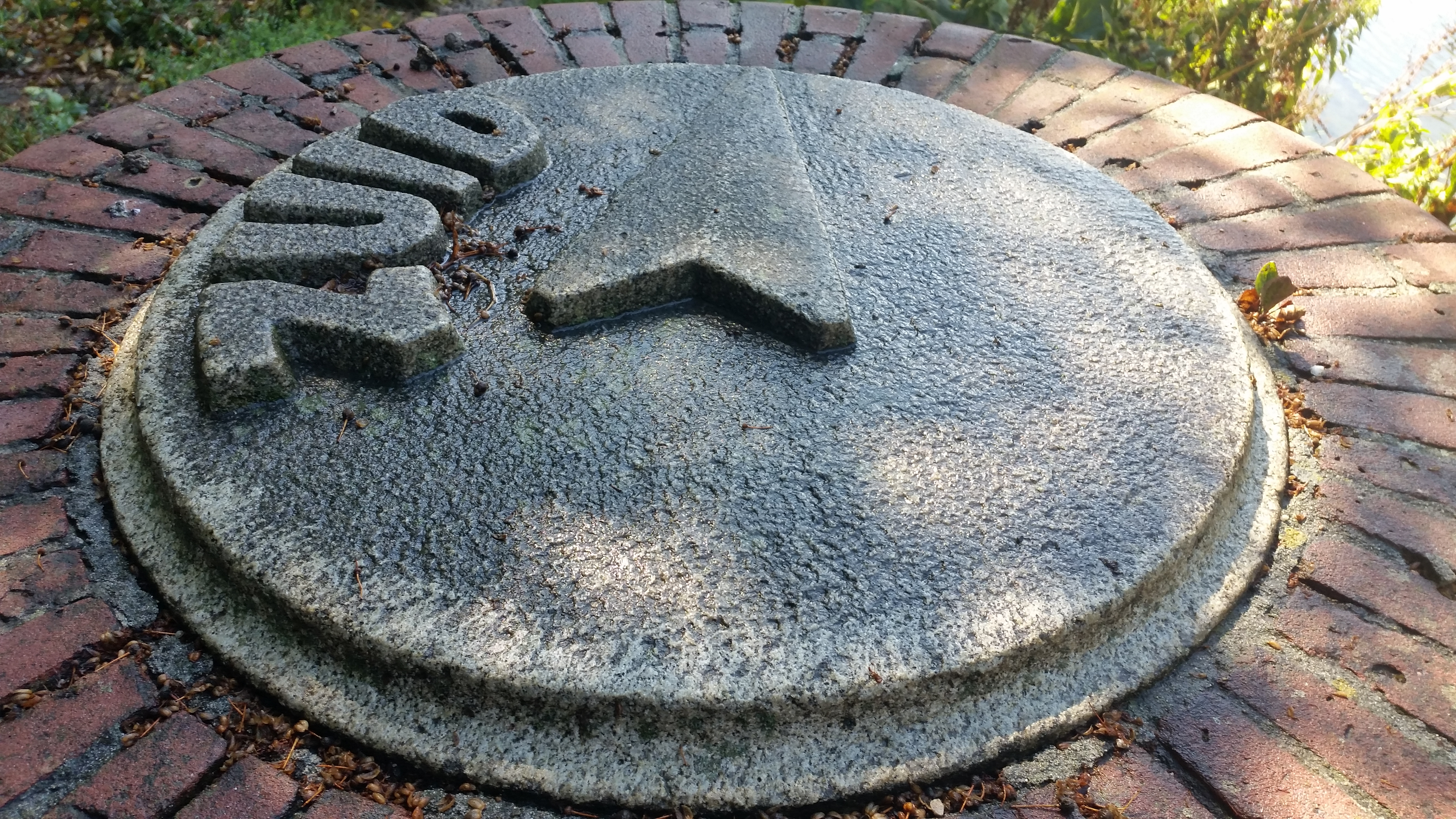 Steen zuid van Brug 543 (in Amsterdam)